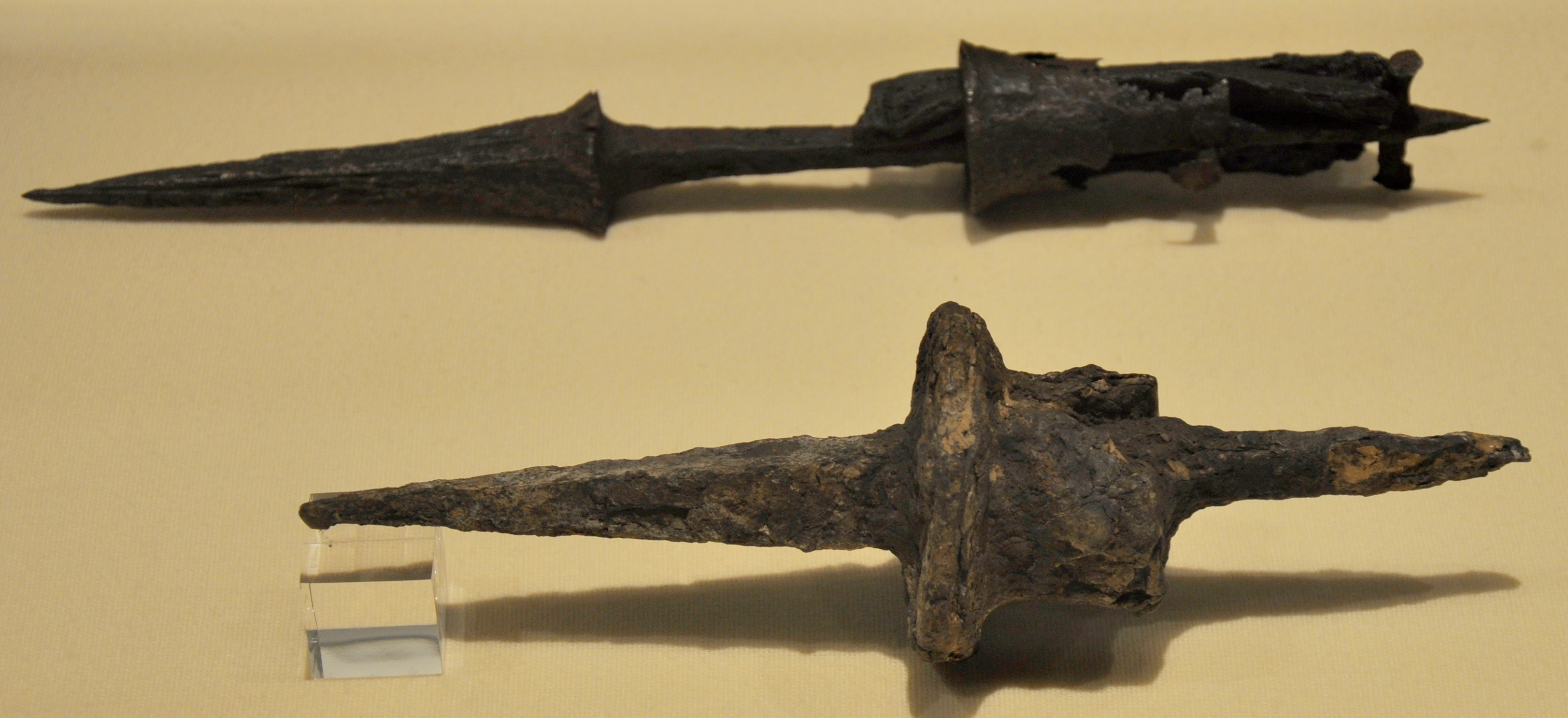 Resten van goedendags in het Museum Kortrijk 1302 te Kortrijk, België